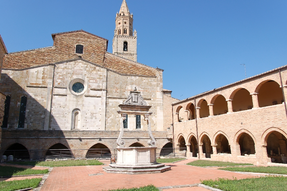 Atri 2011